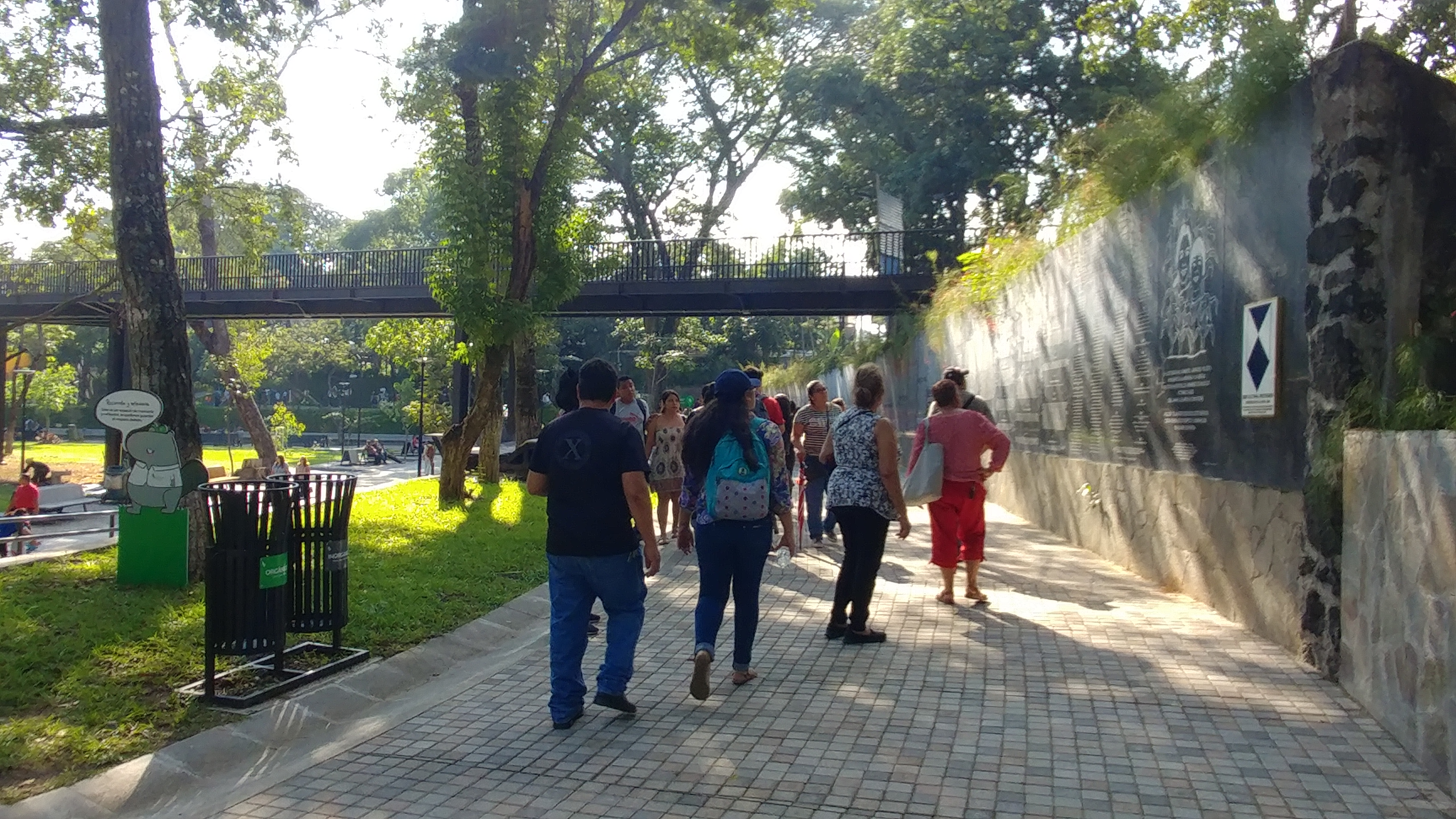 aqui se puede apreciar parte del Mural a la memoria y la verdad